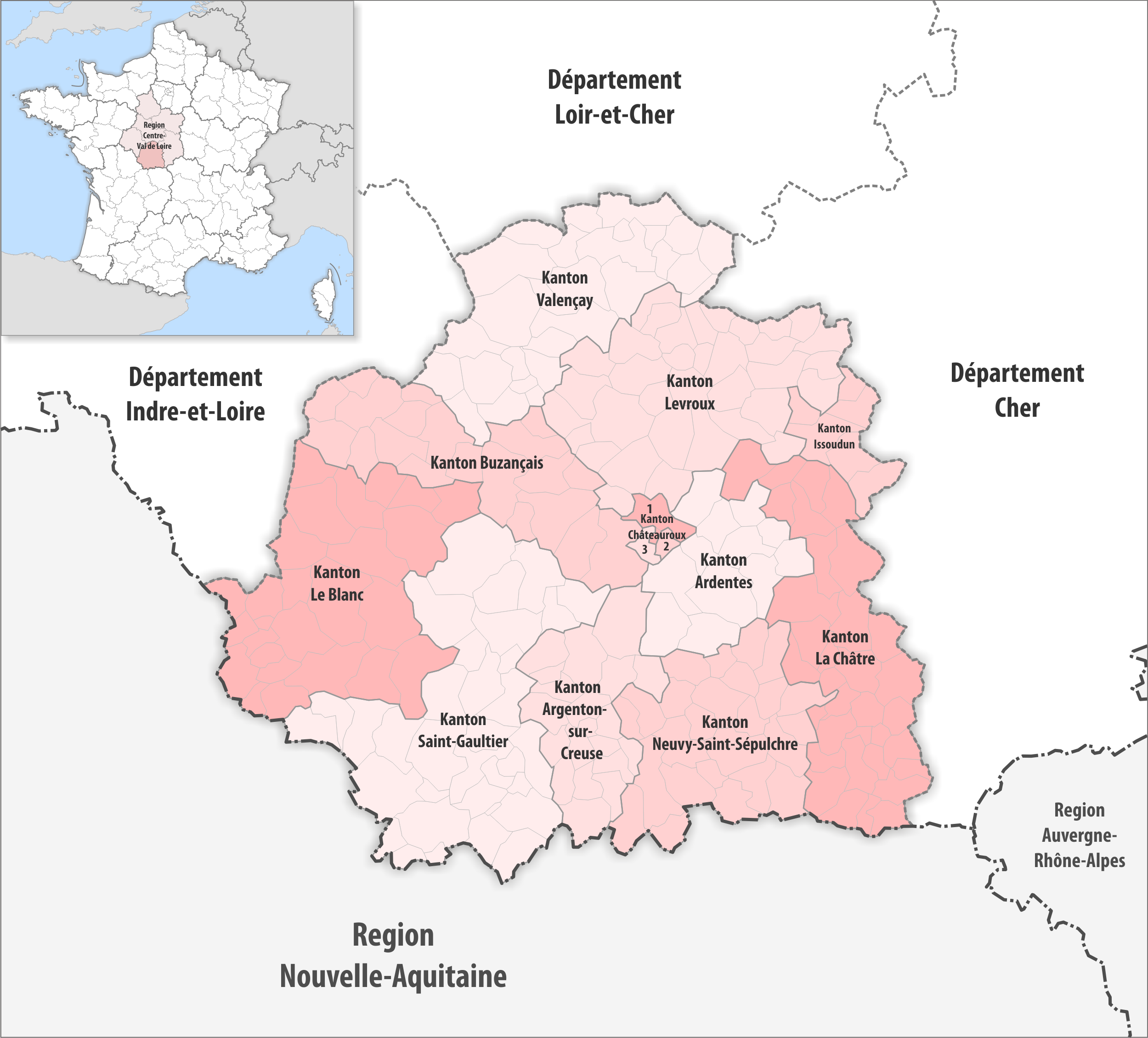 Gemeinden und Kantone im Departement Indre